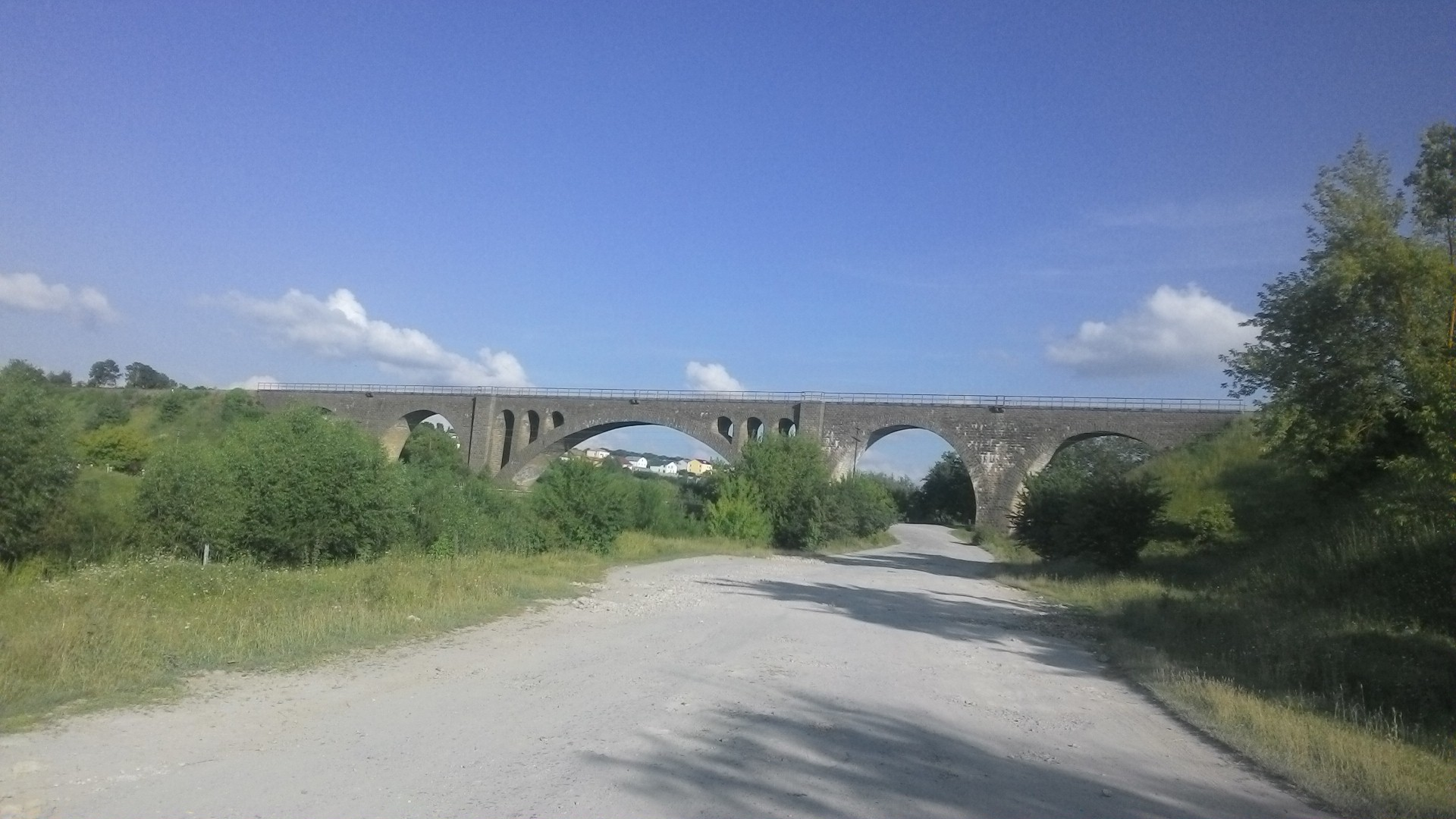 залізничний міст у селі Буцнів (Україна, Тернопільська область), збудований 1897 року, відновлений у 1928–1930 роках.